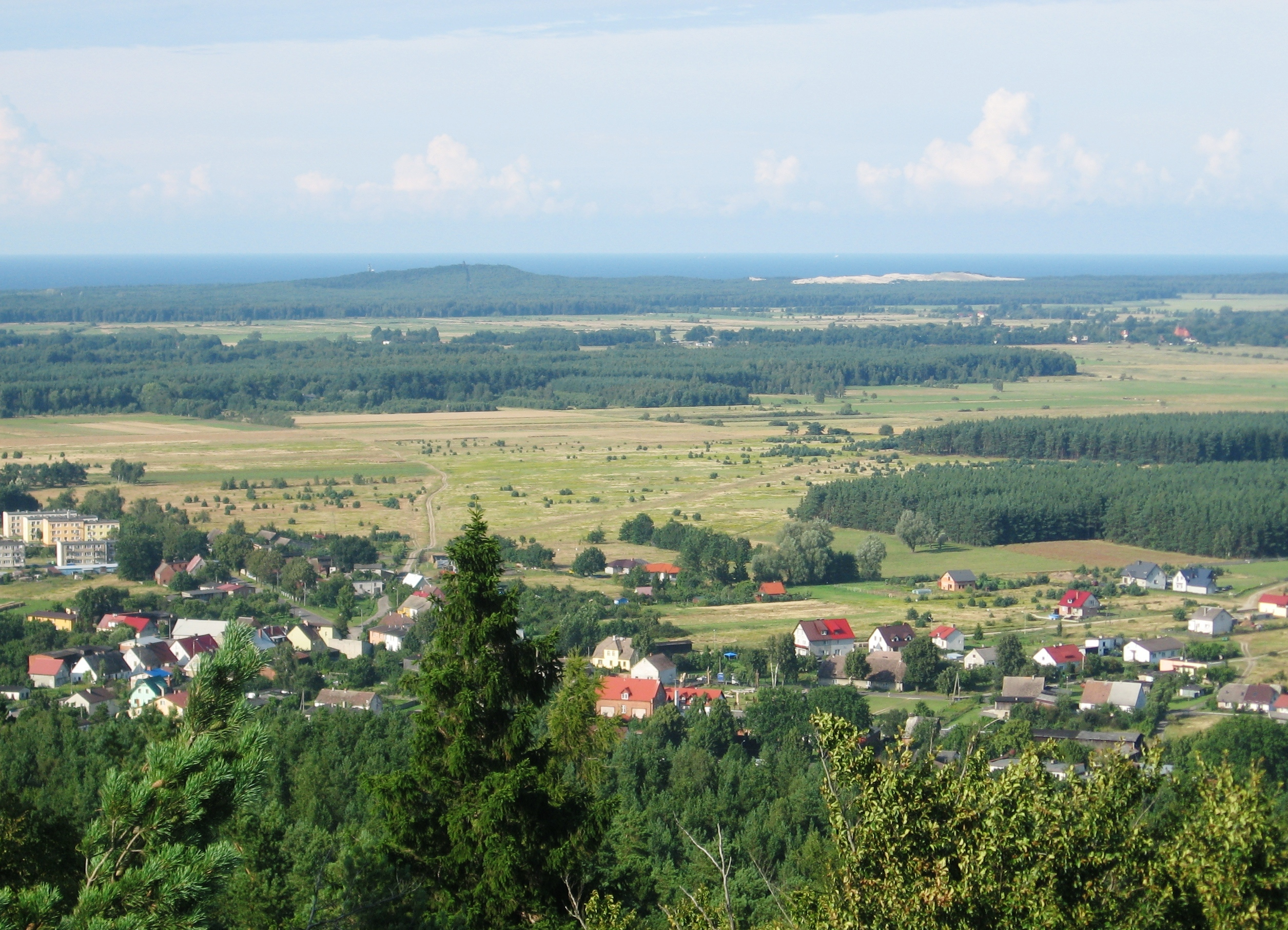 Panorama Smołdzina z góry Rowokół